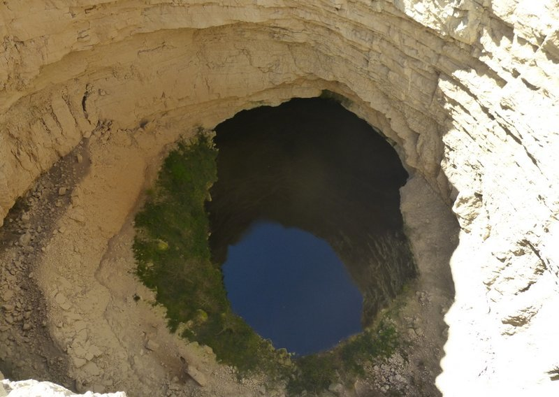 Sima de San Pedro, en Oliete (Teruel, España).